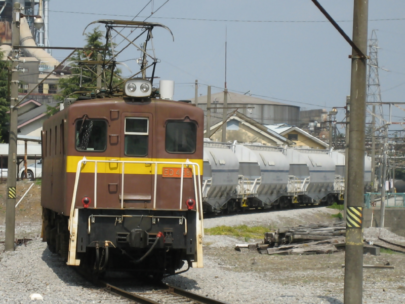 太平洋セメント専用線で入換作業中の三岐鉄道ED458号機。東藤原駅付近にて撮影。